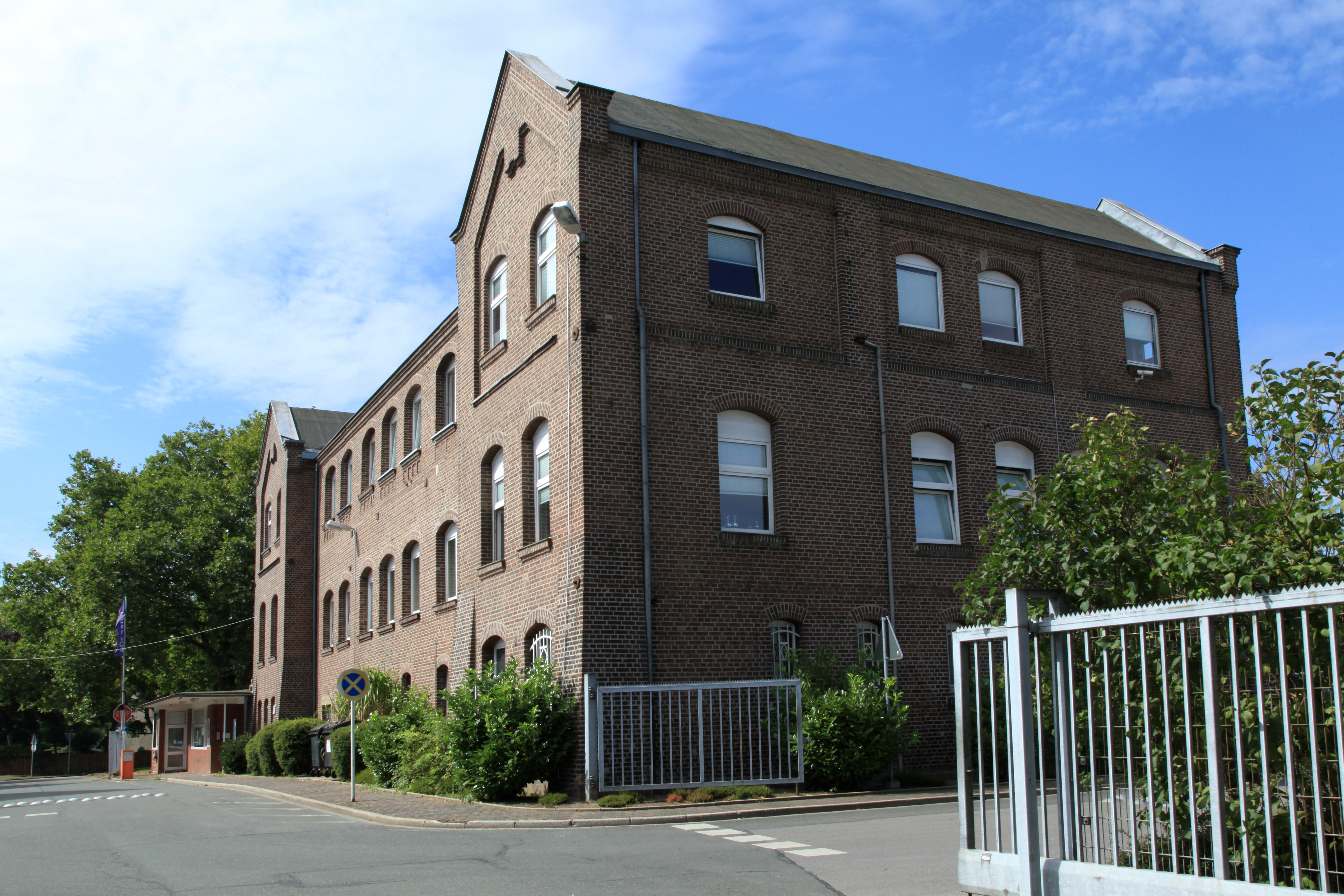 Verbliebene Gebäude der Zeche Rheinbaben, jetzt in Benutzung und auf dem Firmengelände von Eurovia Teerbau GmbH NL Bottrop, Rheinbabenstraße 75 in Bottrop. Die Aufnahmen auf dem eigentlich nicht zugänglichen Firmengelände entstanden mit freundlicher Genehmigung der Eurovia Teerbau GmbH.